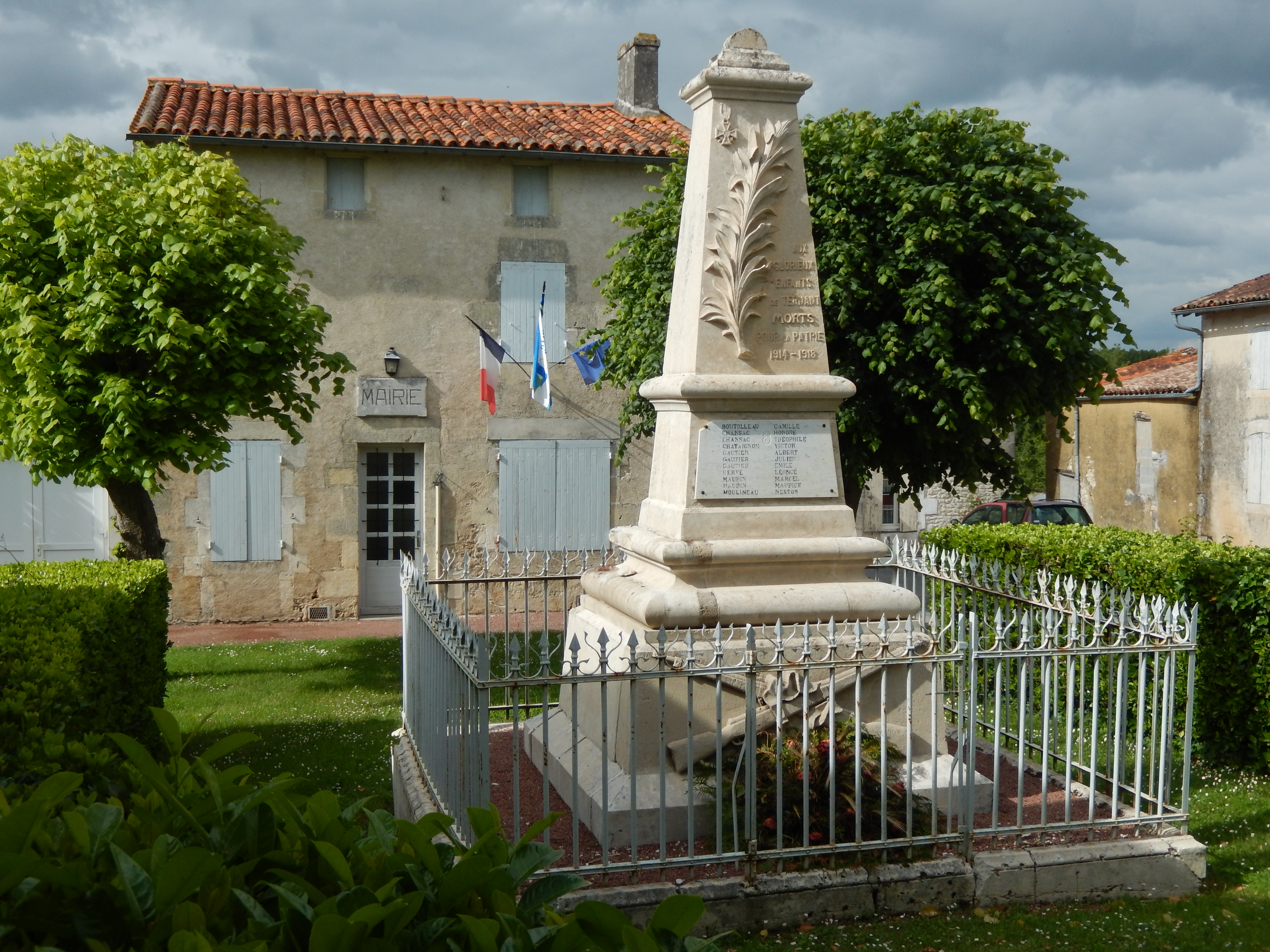 La mairie et le monument aux morts de la commune française de Ternant (Charente-Maritime).